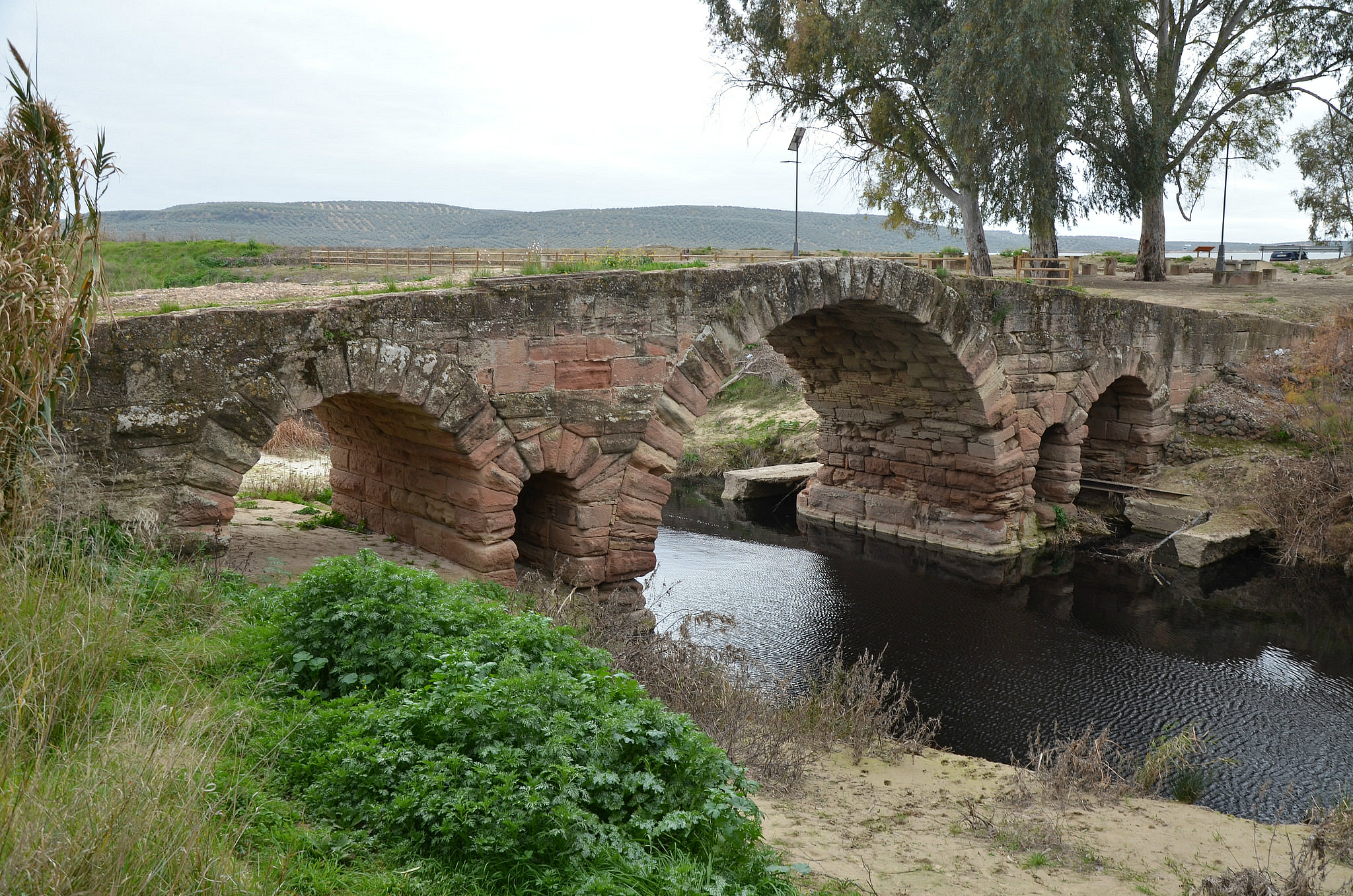 Puente romano de Villa del Rio, Spain